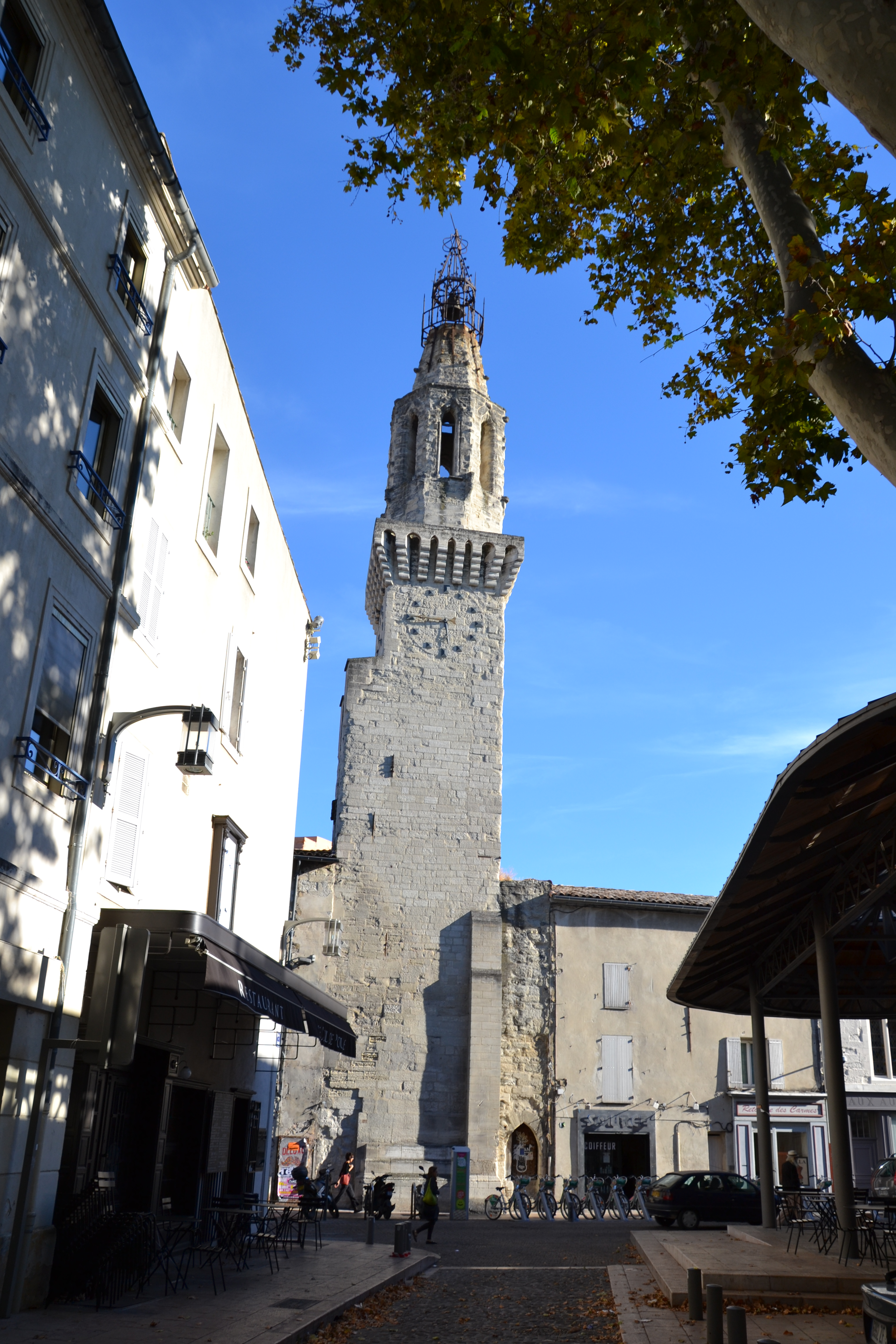 Tour des Augustinstour (Classé) .